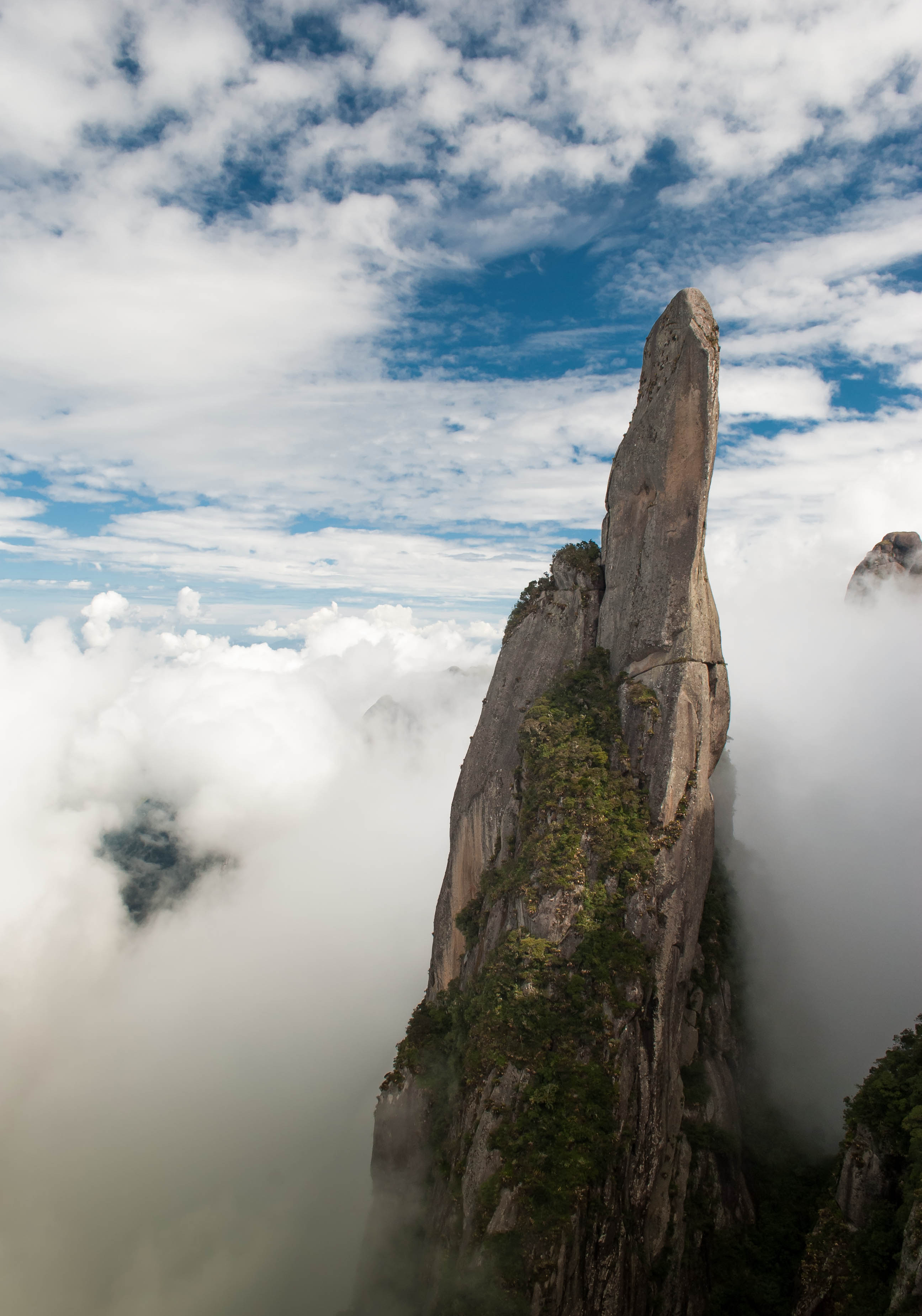 Parque Nacional da Serra dos Orgãos